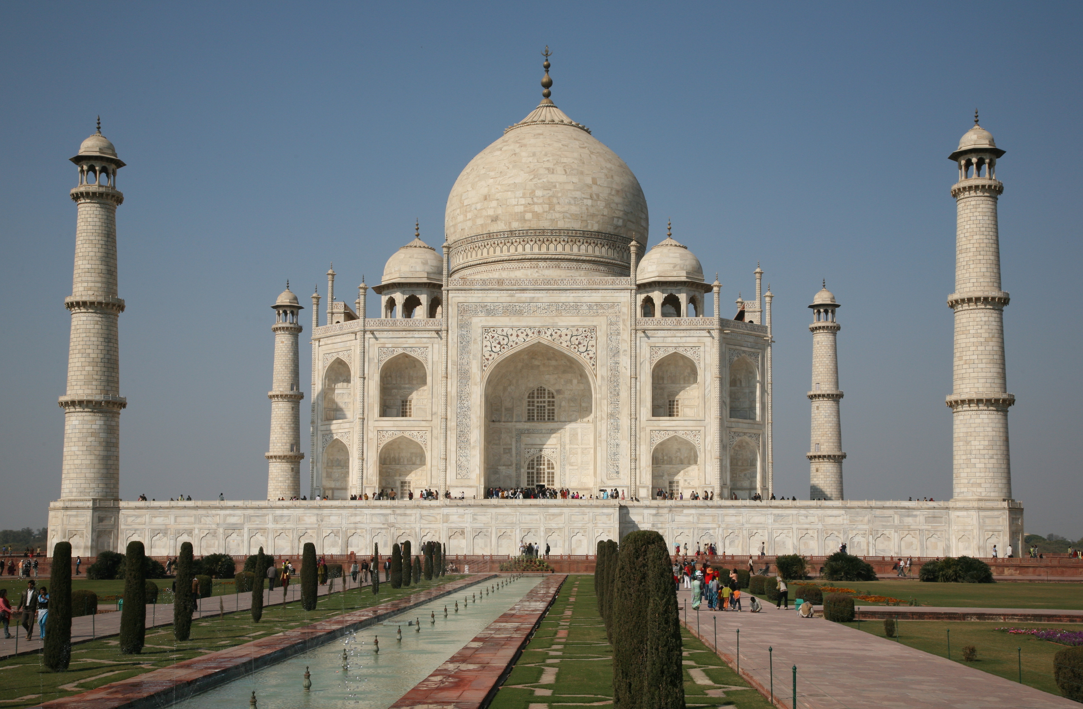 Taj Mahal, Agra, India